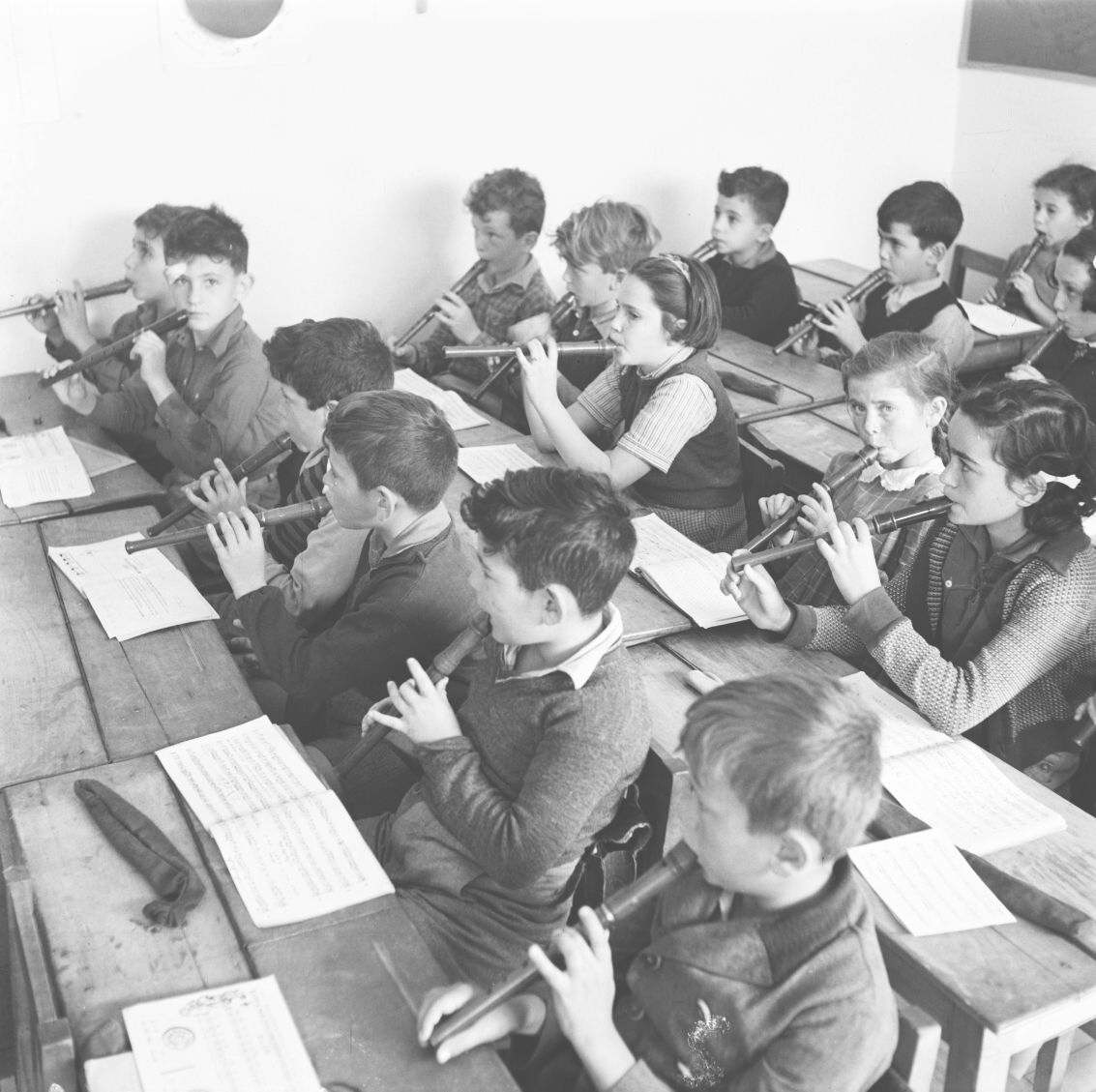 אוסף צילומים של הצלם זולטן קלוגר טווח מספרי התשלילים 26048 - 26085: שיעור חלילית בבית ספר עממי בתל אביב